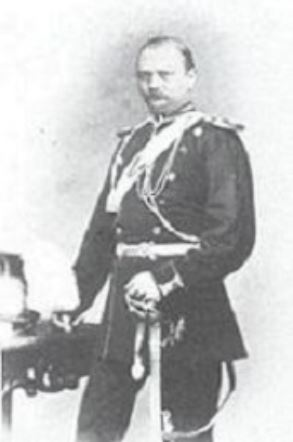 Carl Jauch (1828-1888) als Leutnant des Hamburger Bürgermilitärs.